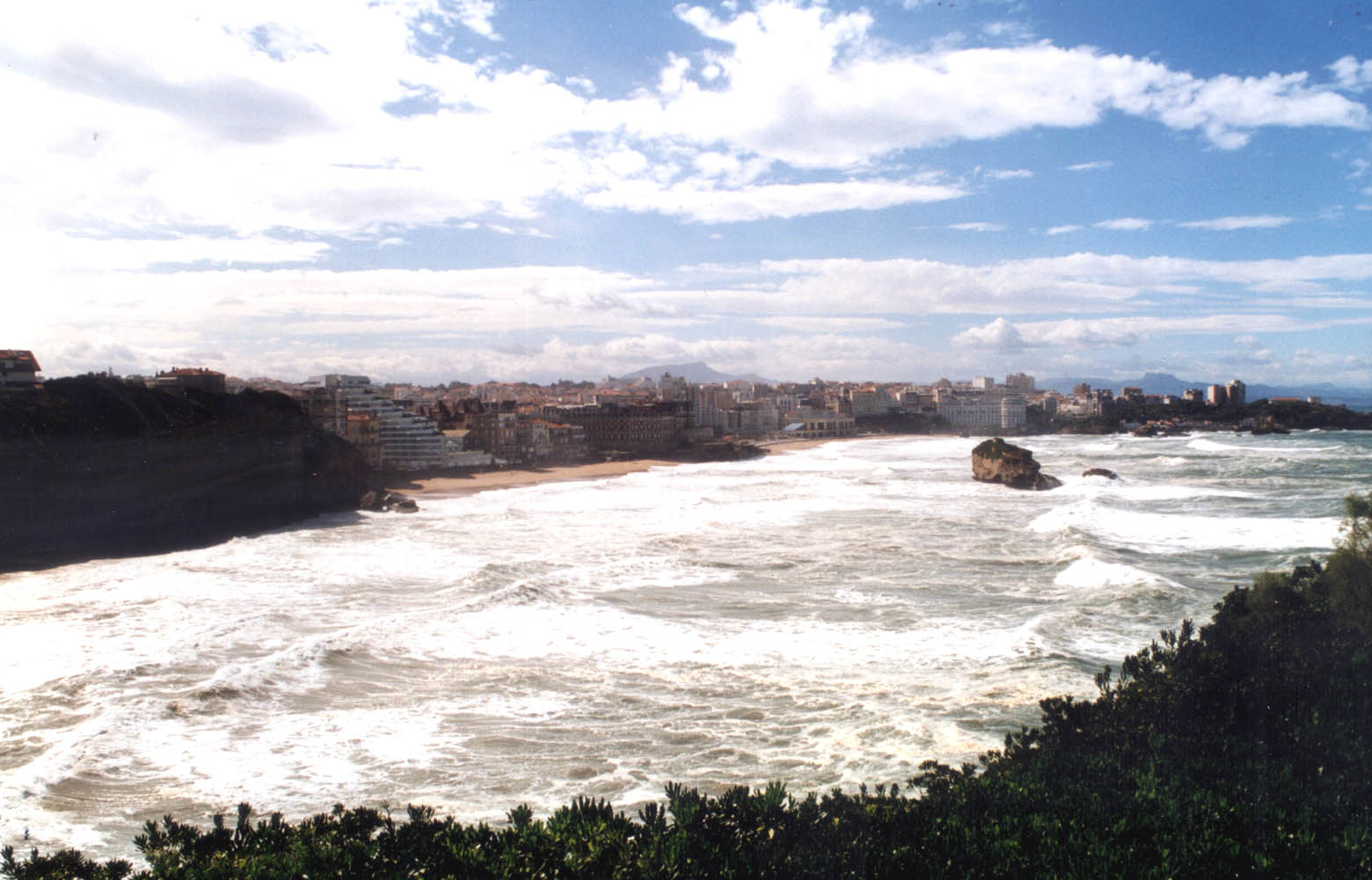 Biarritz